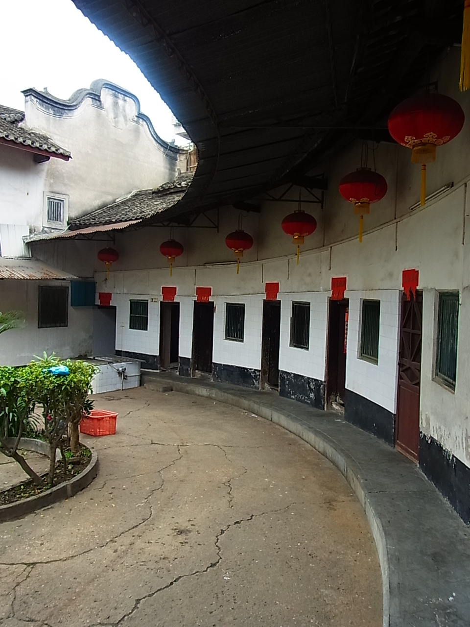 中文（香港）: 梅州围龙屋的一角